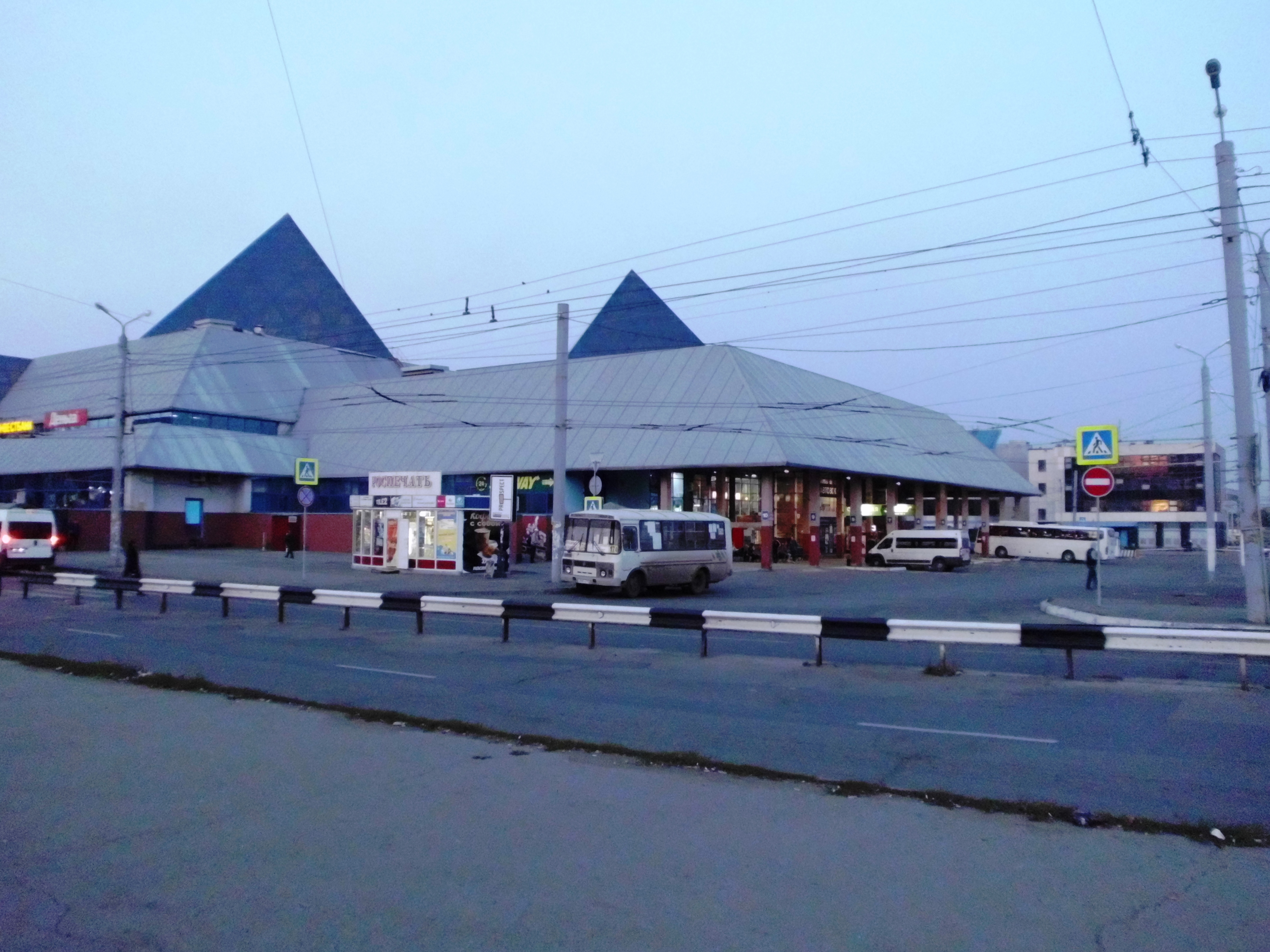 Автовокзал "ТК Синегорье" (Южные ворота). Город Челябинск, ул. Степана Разина, 9. Юго-западная часть здания, 1 этаж. Перроны автовокзала.